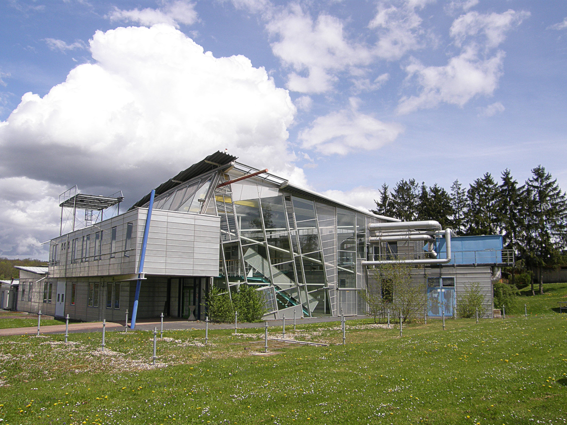 Das HYSOLAR Haus auf dem Campus in Stuttgart Vaihingen